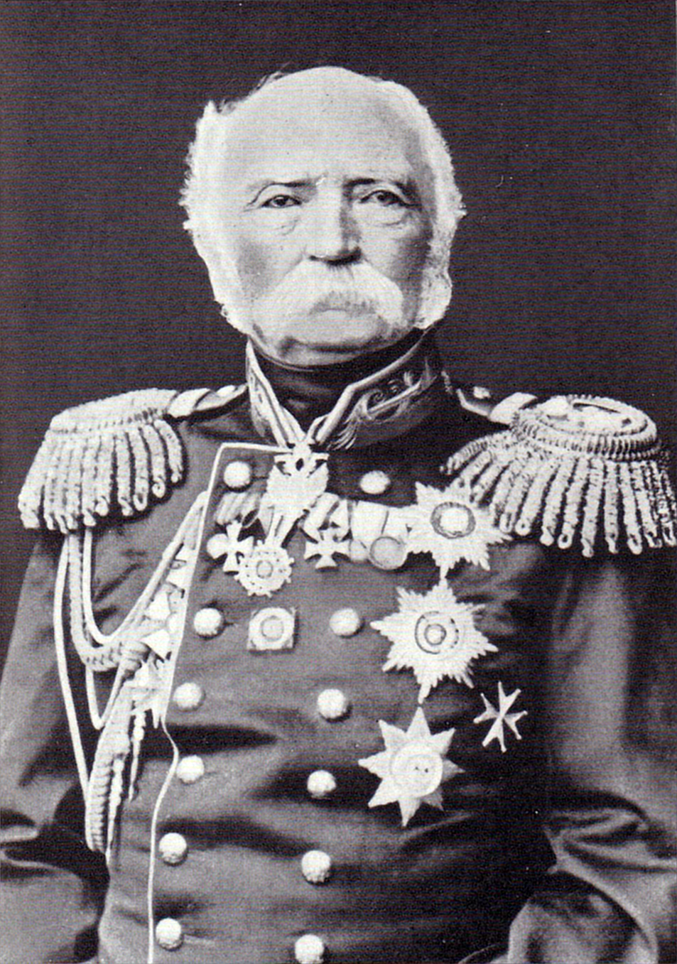 Притвиц, Карл Карлович